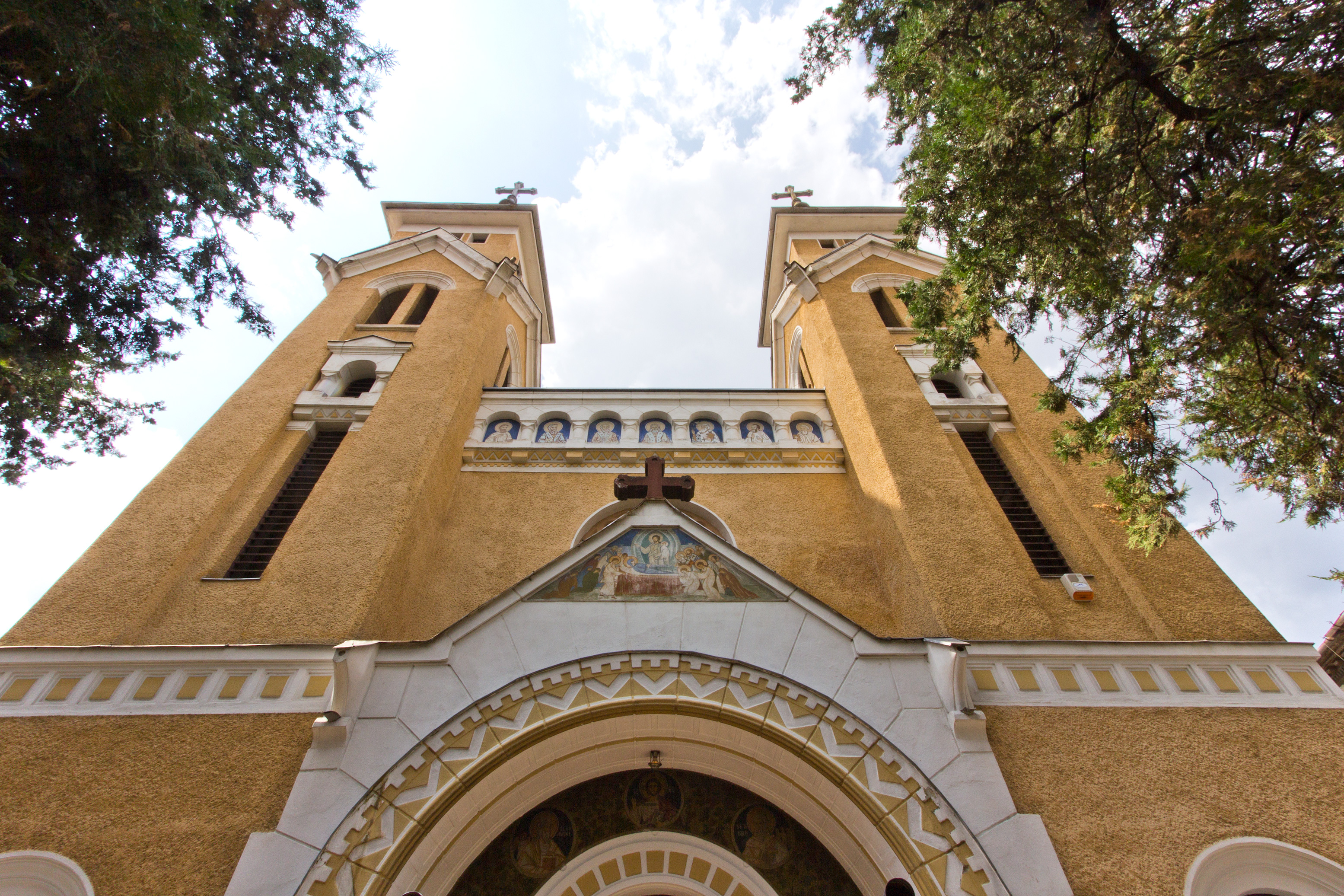 Griechisch-Katholische Kirche im I. Bezirk Centru der Stadt Arad (Rumänien)